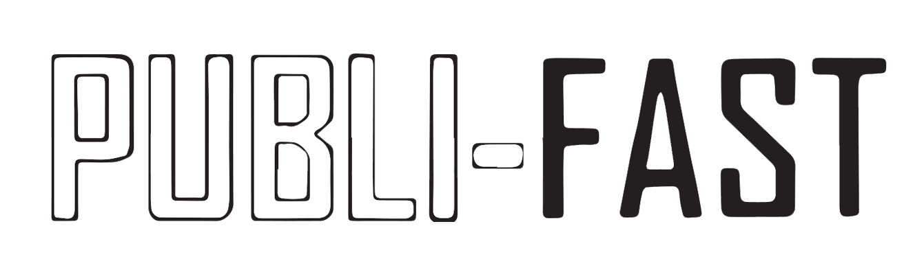 Logo de la empresa PUBLI-FAST realizado desde photoshop e illustrator.